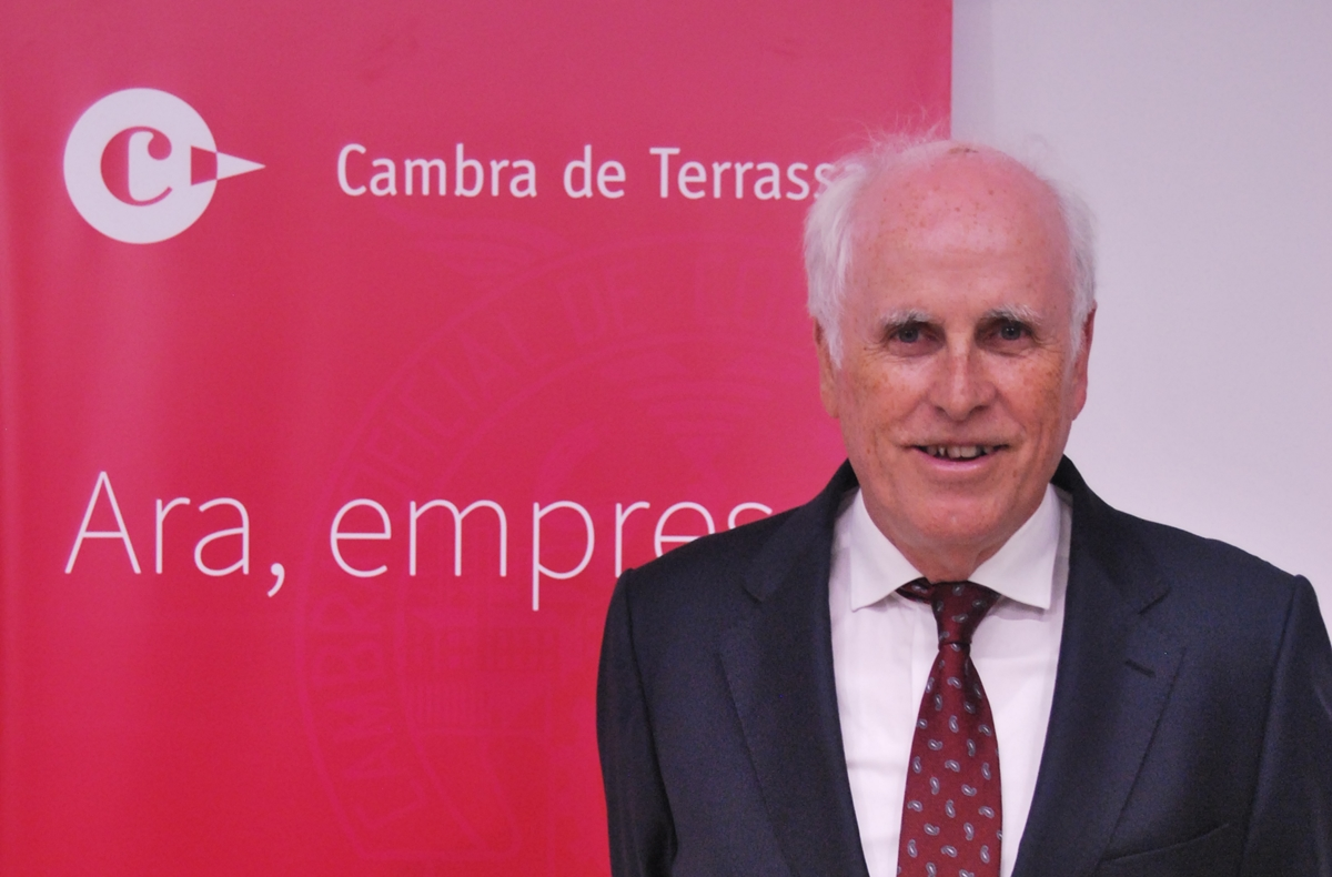 Presidente de la Cámara de Tarrassa